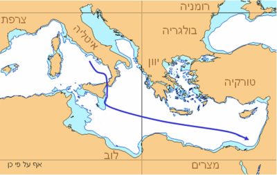 מסלול ההפלגה